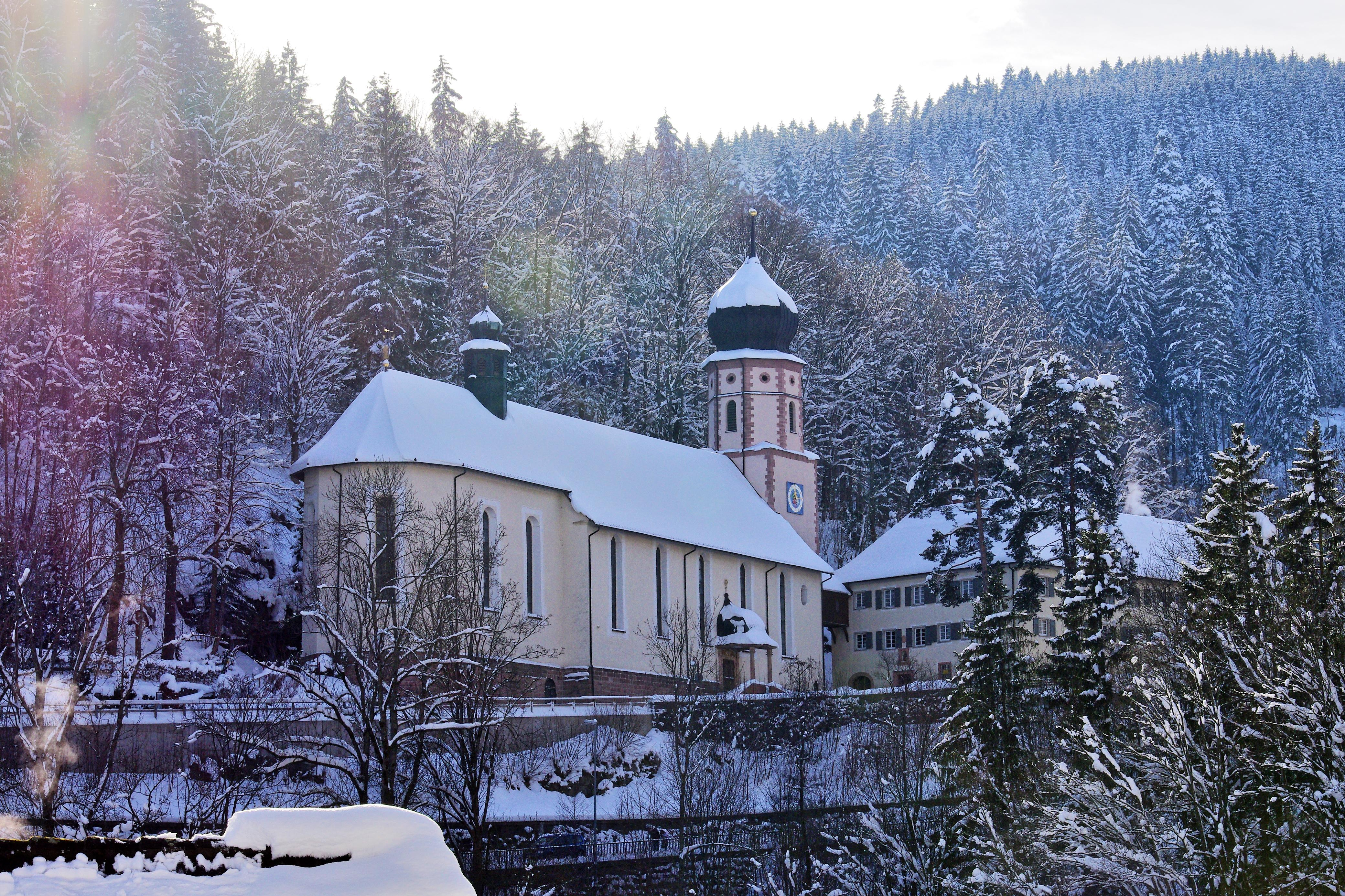 Bilder der Wallfahrtskirche "Maria in der Tanne" in Triberg Schwarzwald